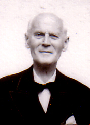 Portrait von Kurt Frick Autor: TeleTim